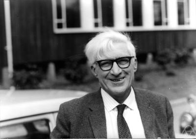 Foto di Dudley E. Littlewood